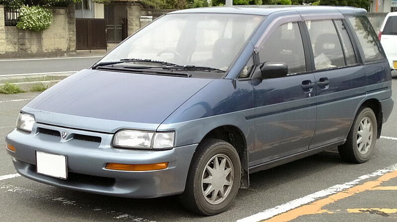 日産・プレーリー（2代目・前期型）